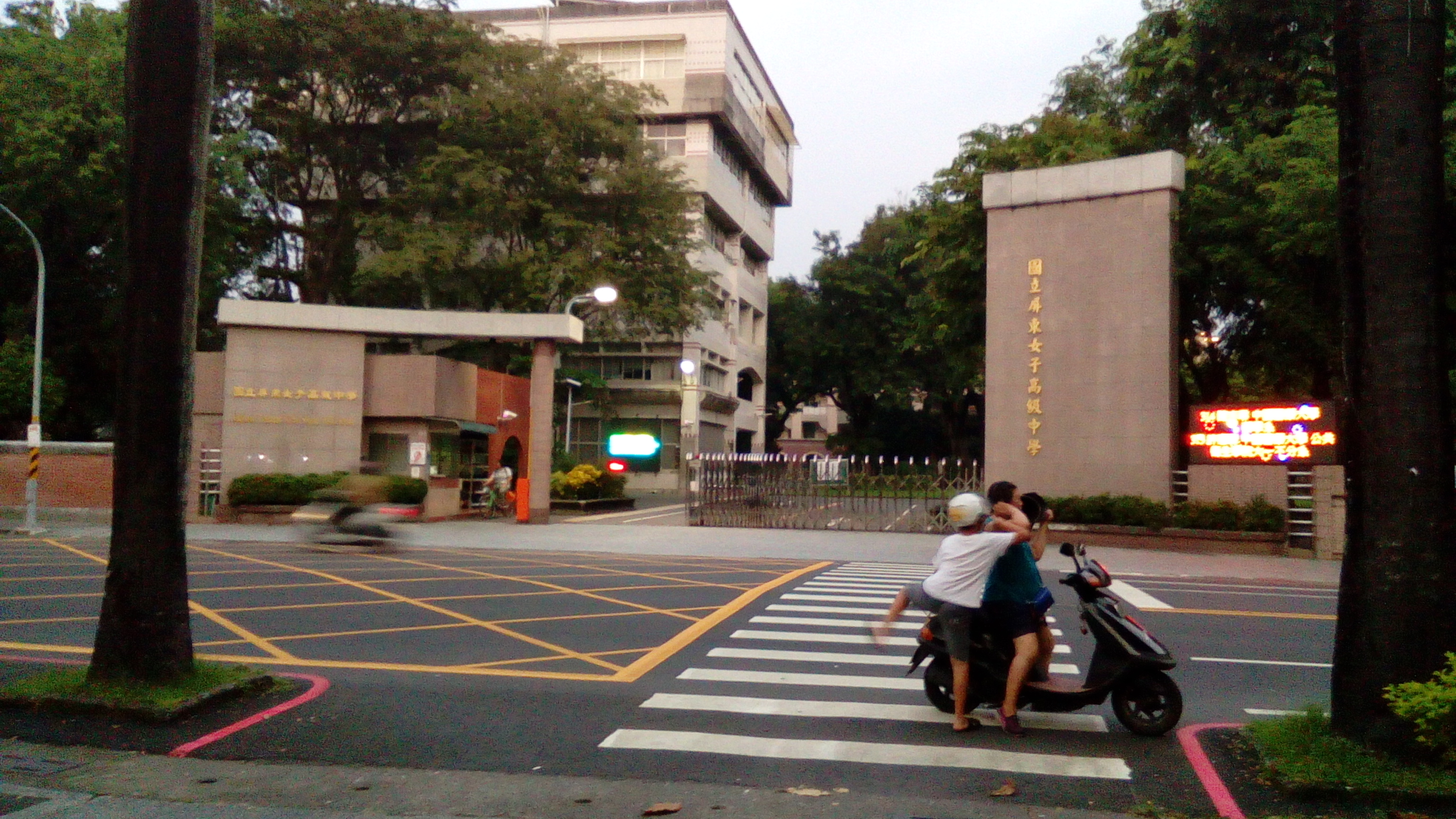 位於仁愛路上，中山公園東面的屏女正門